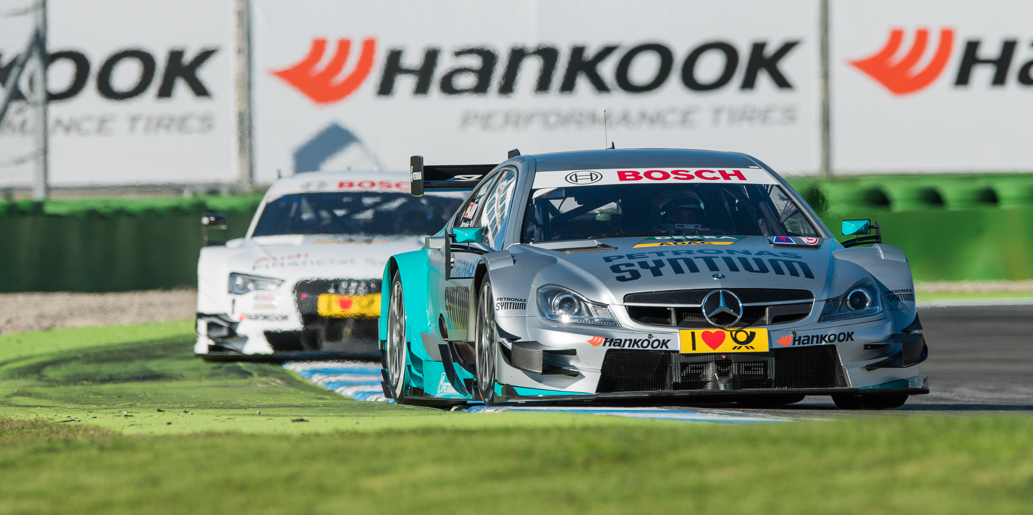 Audi Financial Services Audi RS 5 DTM,DTM,Daniel Juncadella,Deutsche Tourenwagen Masters,Hockenheimring,Motorsport,Mücke Motorsport,Nico Müller,Petronas Mercedes AMG C-Coupe,Team Rosberg GmbH